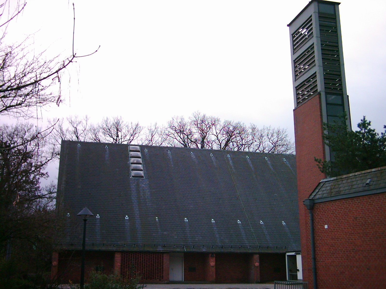 Die ev.-luth. Cornelius-Kirche in Hamburg Neugraben-Fischbek.